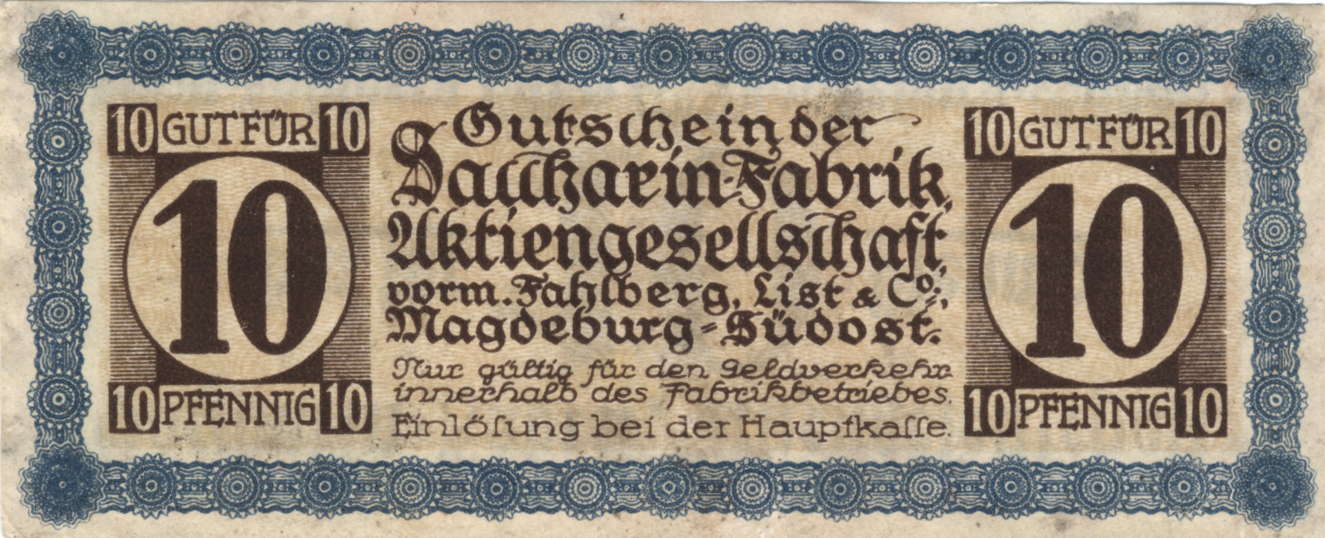 von der Saccarin-Fabrik AG in Magdeburg-Südost in den 1920ern herausgegebenes Notgeld, 10-Pfennig-Gutschein